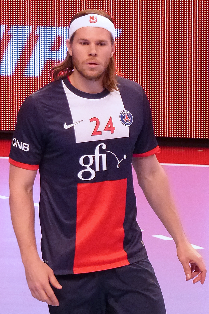 Mikkel Hansen, arrière gauche du PSG Handball lors du match face à Nantes le 10 avril 2014.